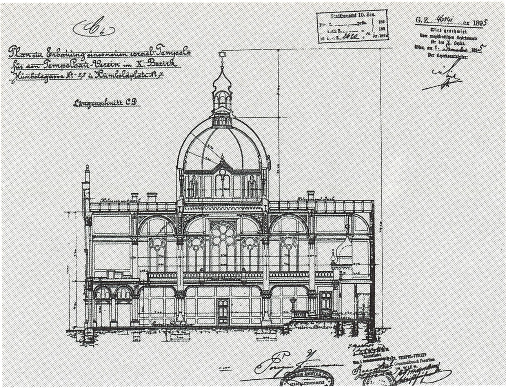 Die Synagoge in der Humboltgasse, Längsschnitt, Entwurf von Jakob Gartner.